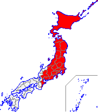 東日本の地図。三重・岐阜・信越以東